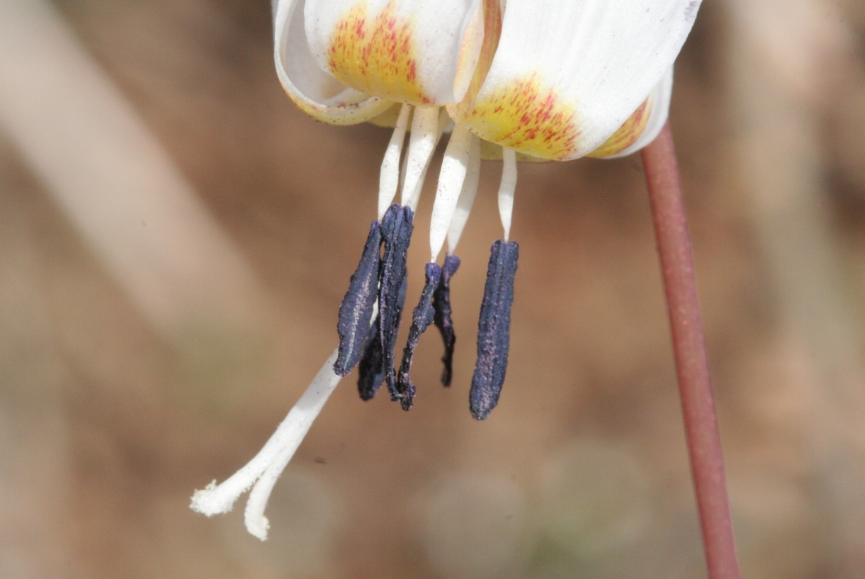 Erythronium_dens-canis (Dente di Cane) Località : Pasa, Sedico (BL), 356 m s.l.m.